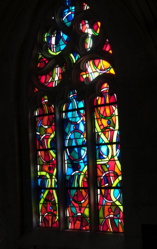 Collégiale de Romont (Suisse), 1980. Maître verrier: Michel Eltschinger.